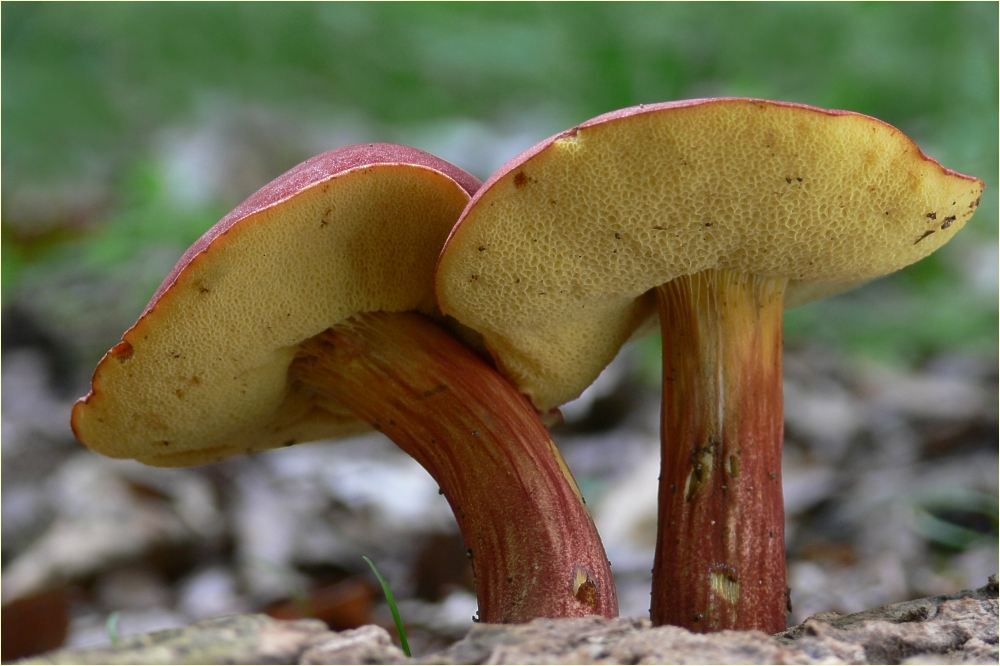 Blutrote Röhrlinge (Xerocomus rubellus)